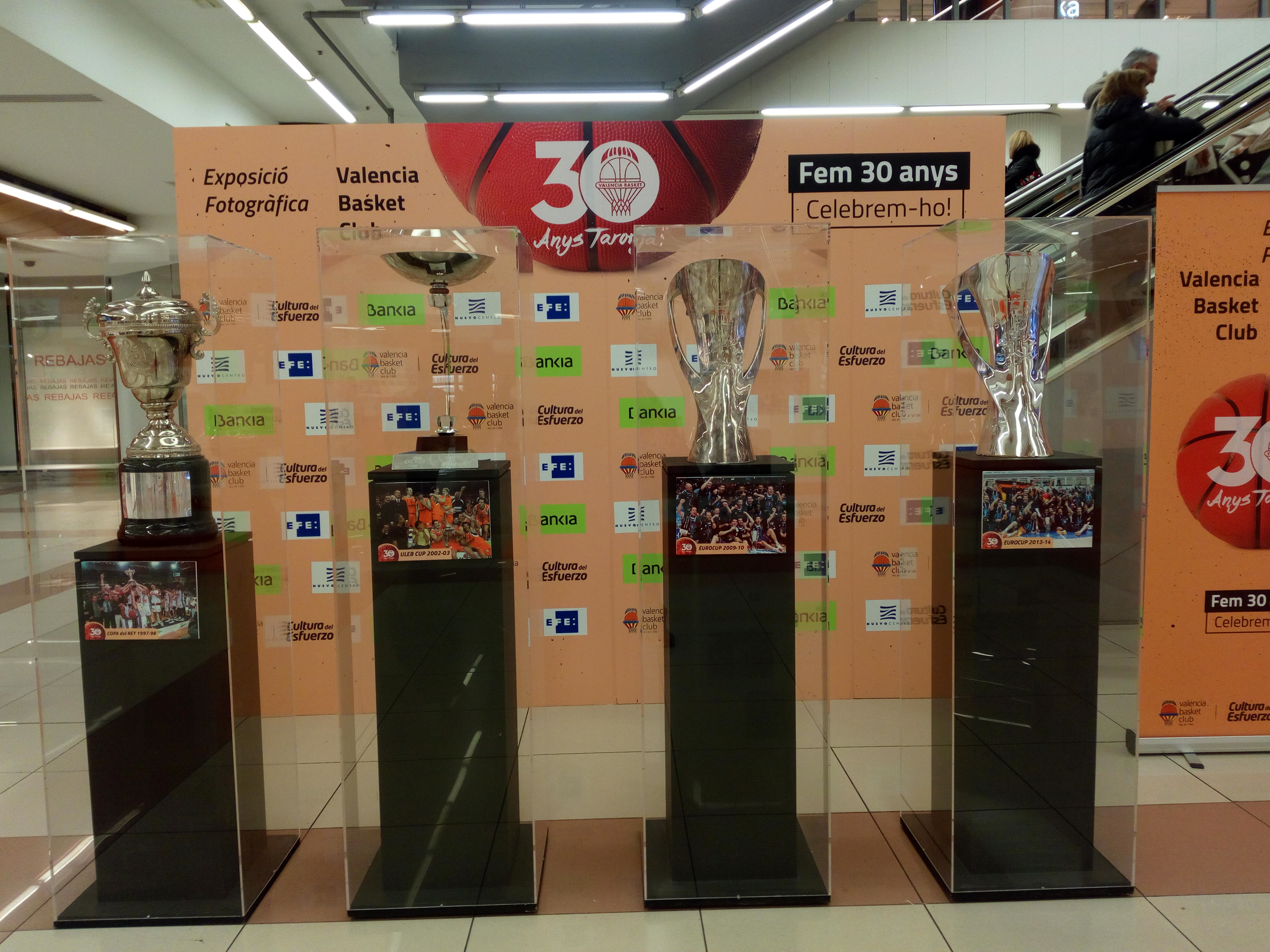 Trofeos del Valencia Basquet Club: (de izq. a der.) Copa de España, Eurocup (x3)